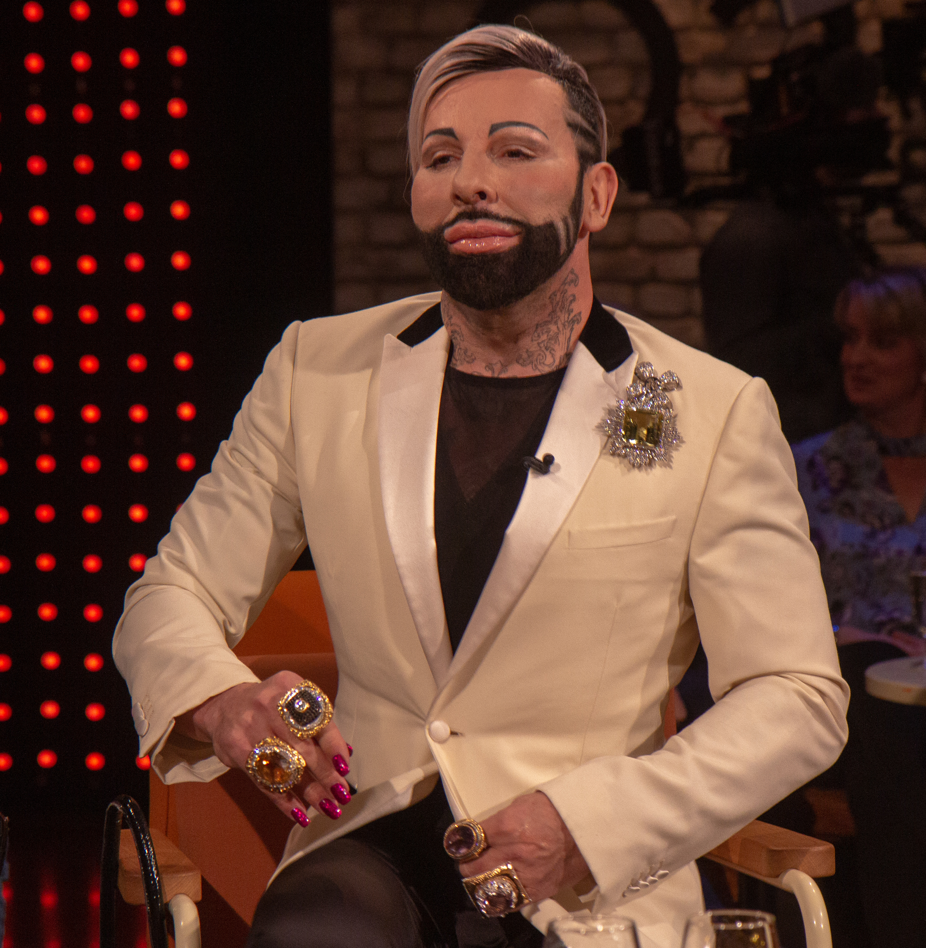 Harald Glööckler: Sendung 3 nach 9 am 23. November 2018 in Bremen